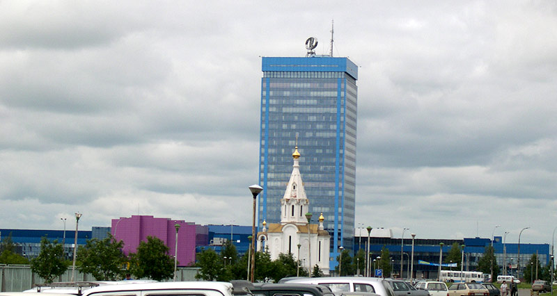 Togilatti_administration_VAZ.jpg